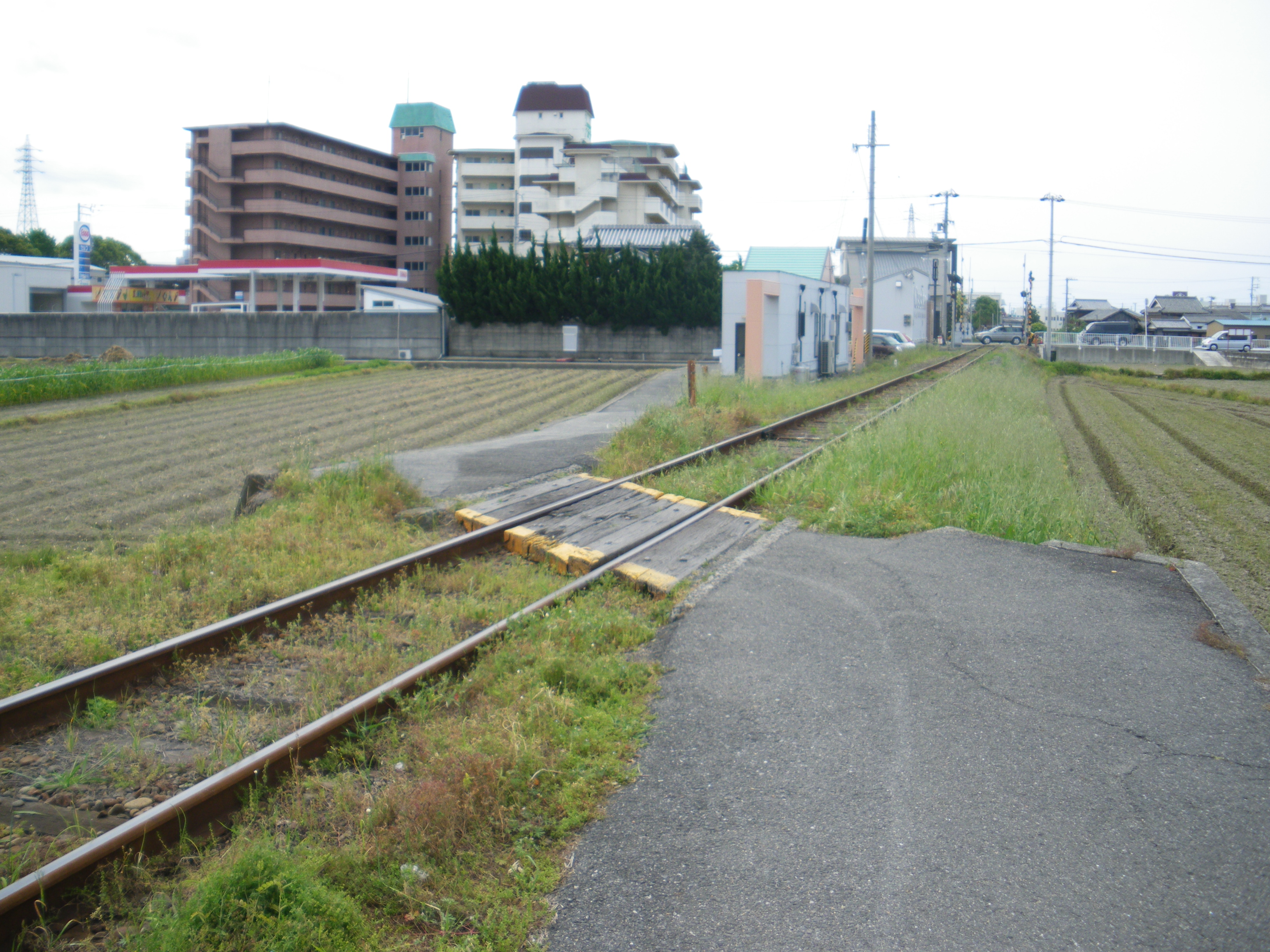 紀州鉄道、学門駅周辺